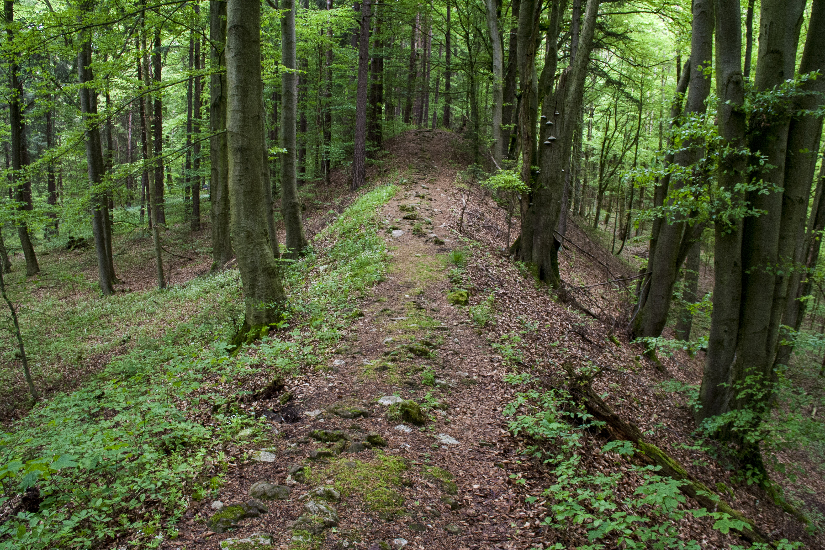 Houbirg, Happurg, Landschaftsschutzgebiet Südlicher Jura mit Moritzberg und Umgebung